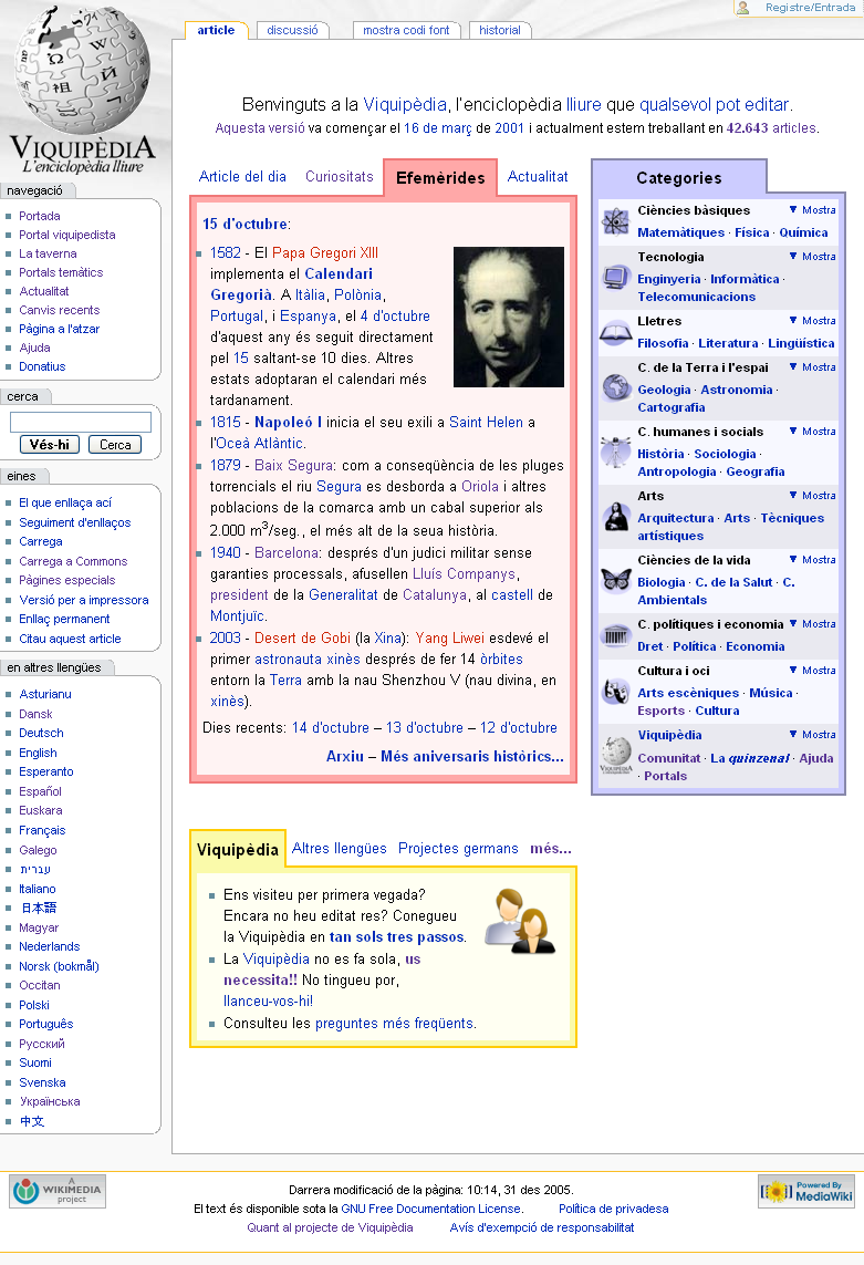 Presa de pantalla de la Viquipèdia en català a l'octubre del 2006